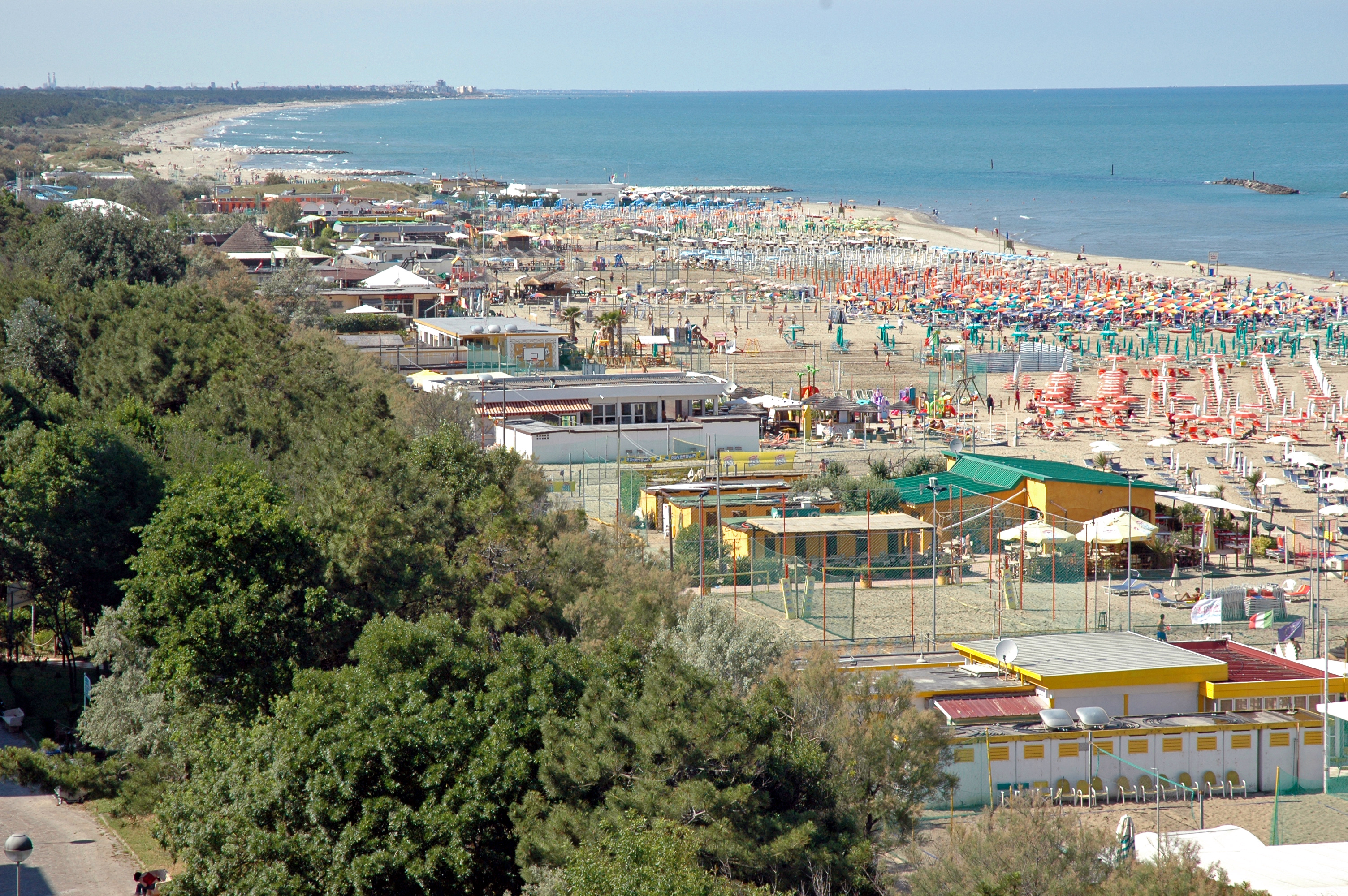 Scorcio di spiaggia di Lido di Classe